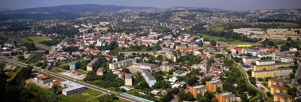 Горлице.